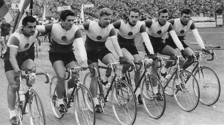 Friedensfahrt, Mannschaft der UdSSR Zentralbild Wendorf. Ko.Hr.3.5.1961.Sowjetische Mannschaft zur XIV. Friedensfahrt 1961. UBz: Die sowjetischen Friedensfahrer vor dem Start im "Stadion des Zehnten Jahrestages" in Warschau: vlnr: Saidchushin, Melichow, Petrow, Moskwin, Kapitonow und Tscherepowitsch.